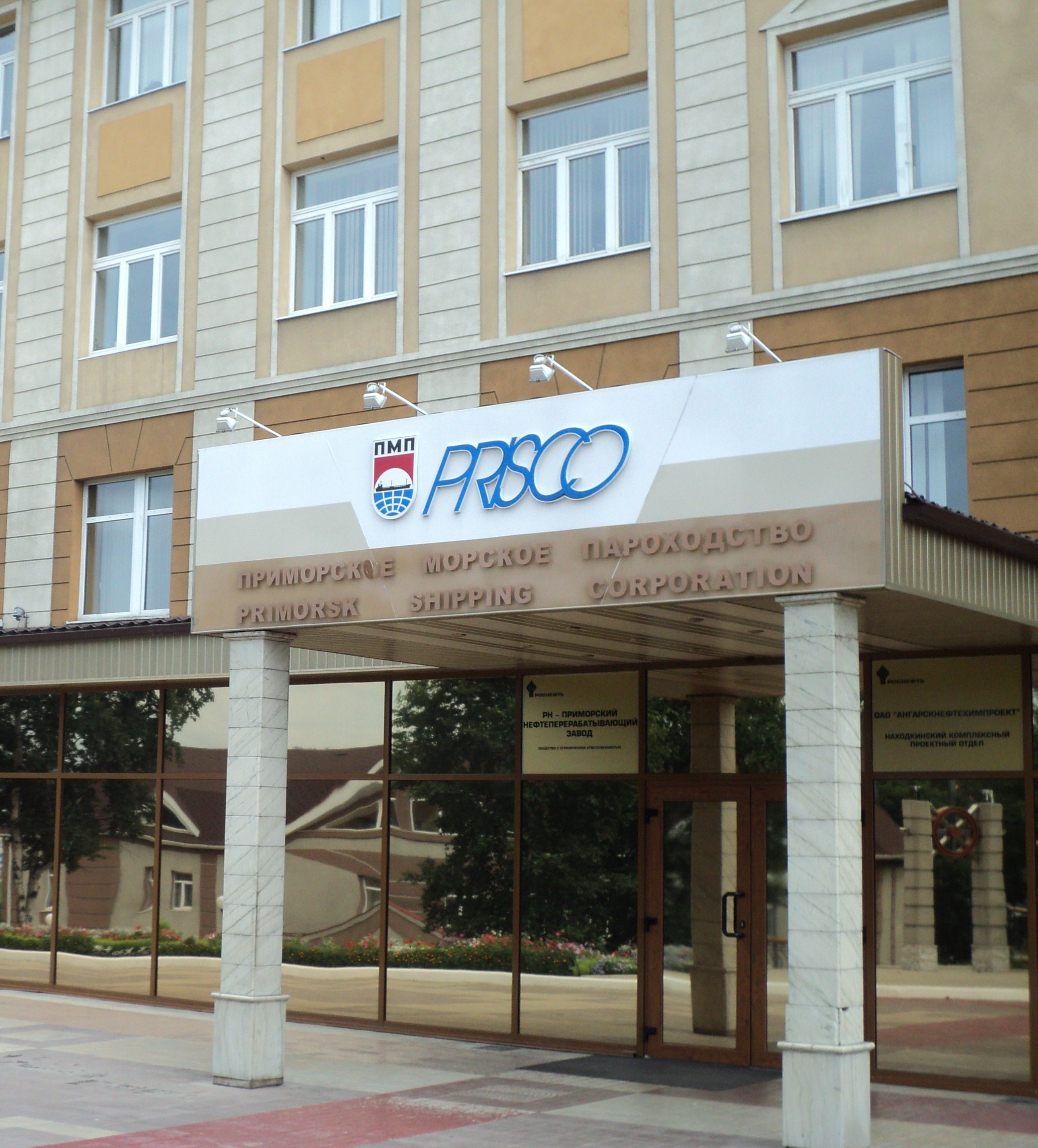 Штаб-квартира Приморского пароходства в Находке